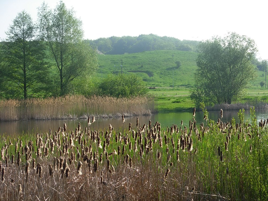 LKPiW Myślęcinek w Bydgoszczy